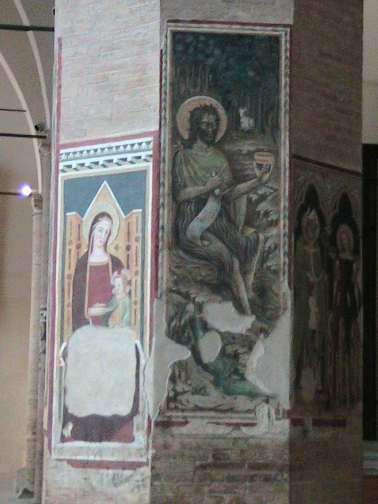 Atri- Cattedrale di Santa Maria Assunta - Affreschi dell'interno